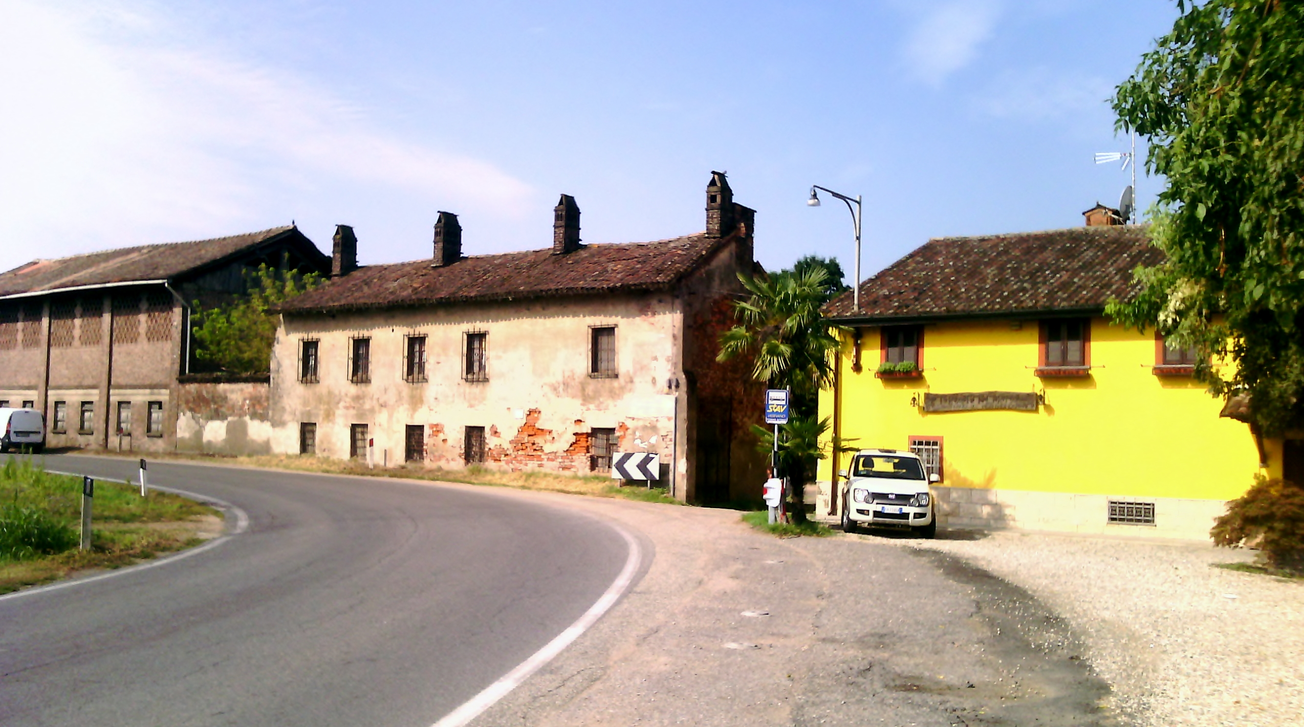 Veduta della cascina di Basiano, frazione di Morimondo (MI)